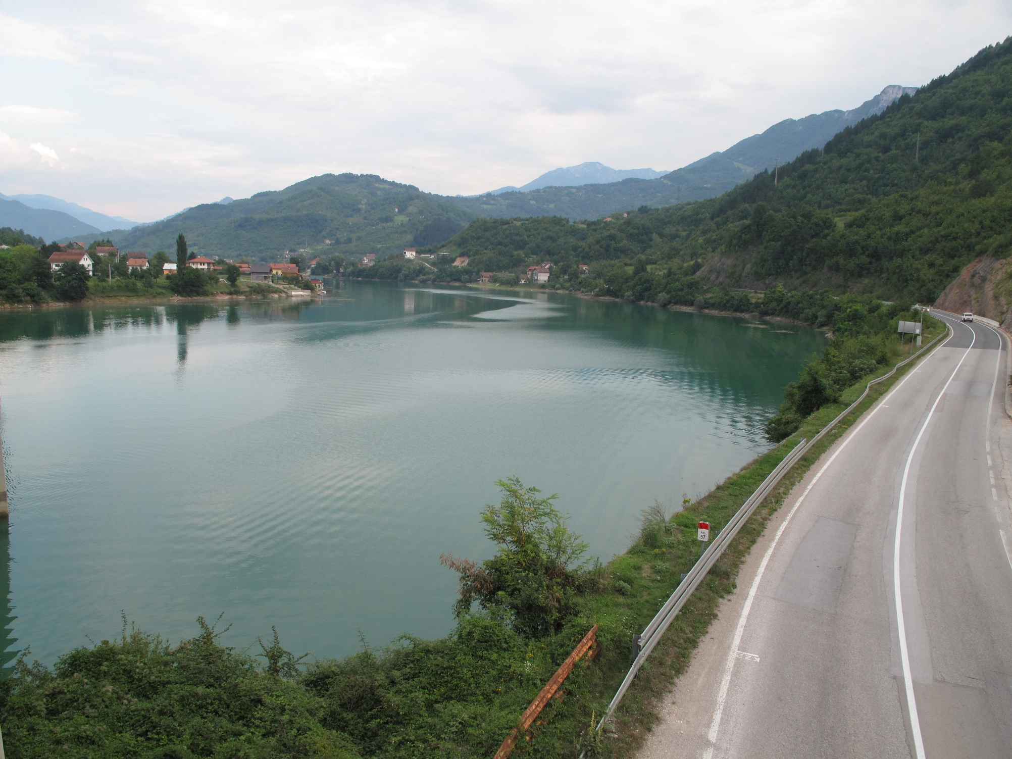 Jablaničko jezero